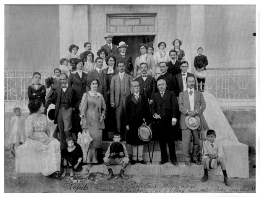 Visita de Ruy Barbosa a Poços de Caldas, em 1910, cidade então administrada pelo prefeito Francisco Escobar